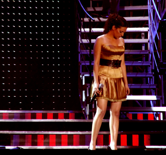 Maya rotman, 'Volume Tel-Aviv' 2006